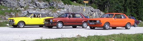 Ford Taunus Modell 1971, 1980 und 1976